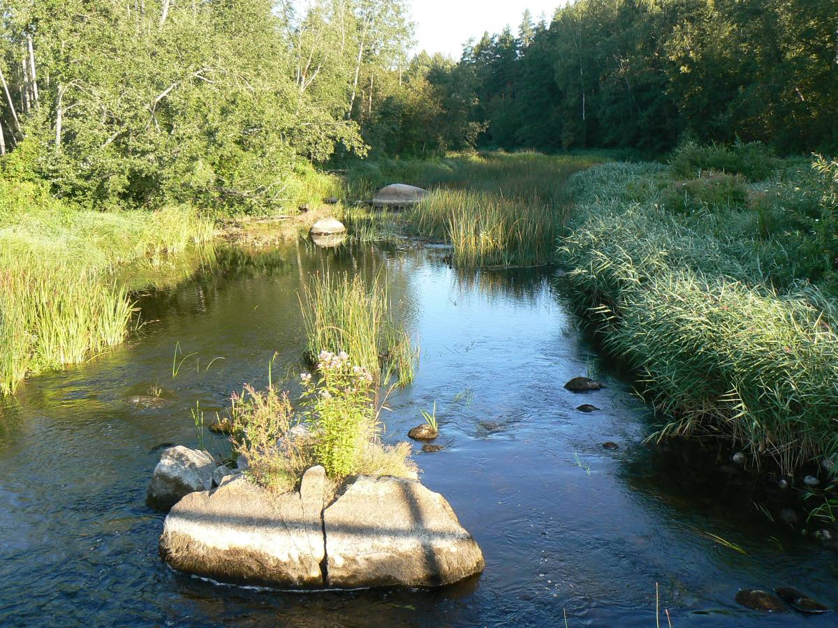 Navesti jõgi